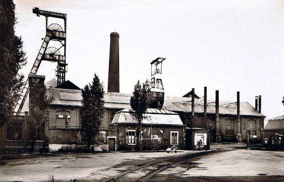 Fosse 5 de Bruay située à Divion